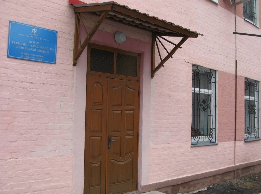 Вхід до приміщення РЦТКум